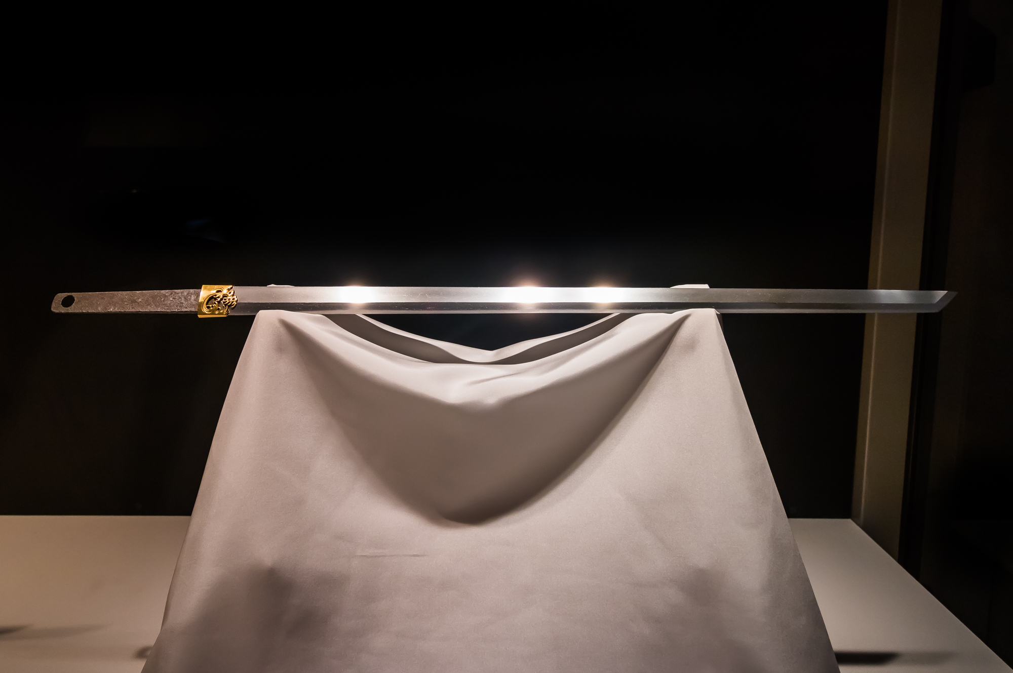 直刀。無銘、号「水龍剣」（重要文化財）。 8世紀、奈良時代。